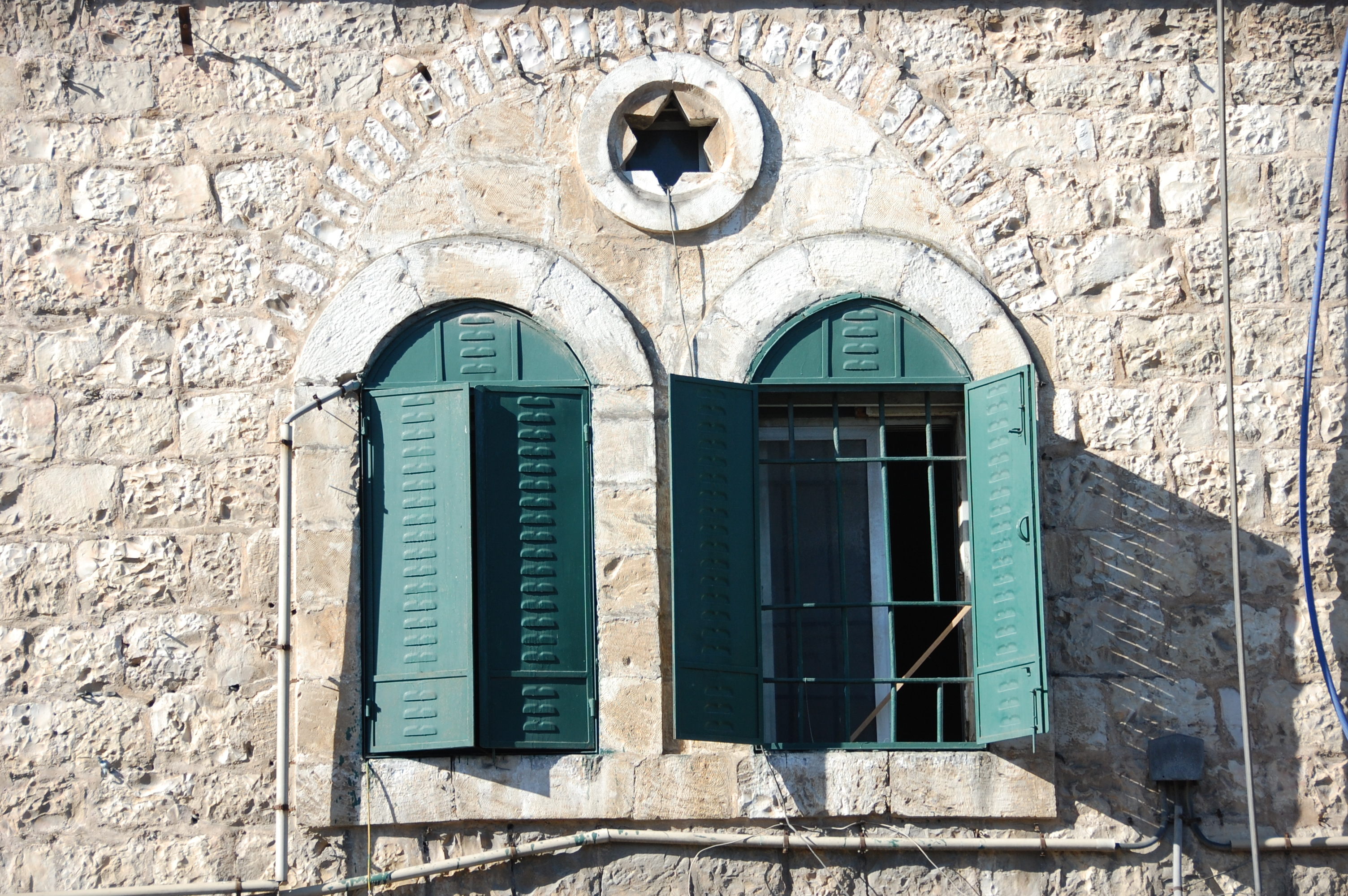 a window at nahlaot, jerusalem